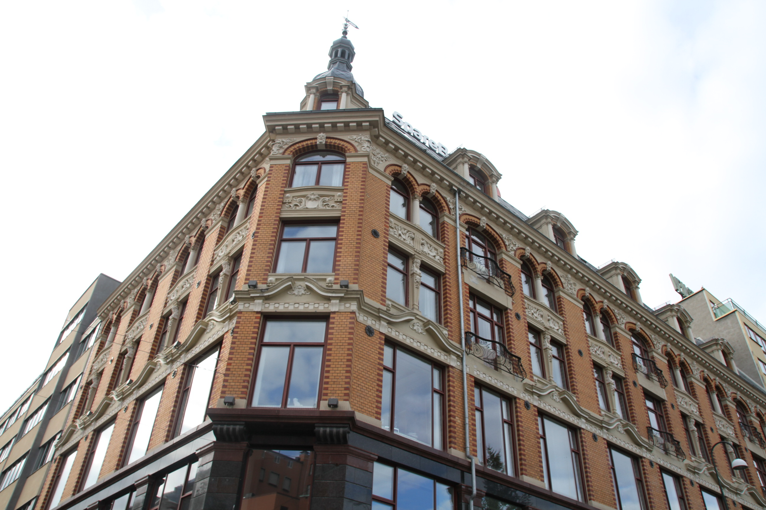 Stensbackgården, Youngstorget 5 i Oslo.